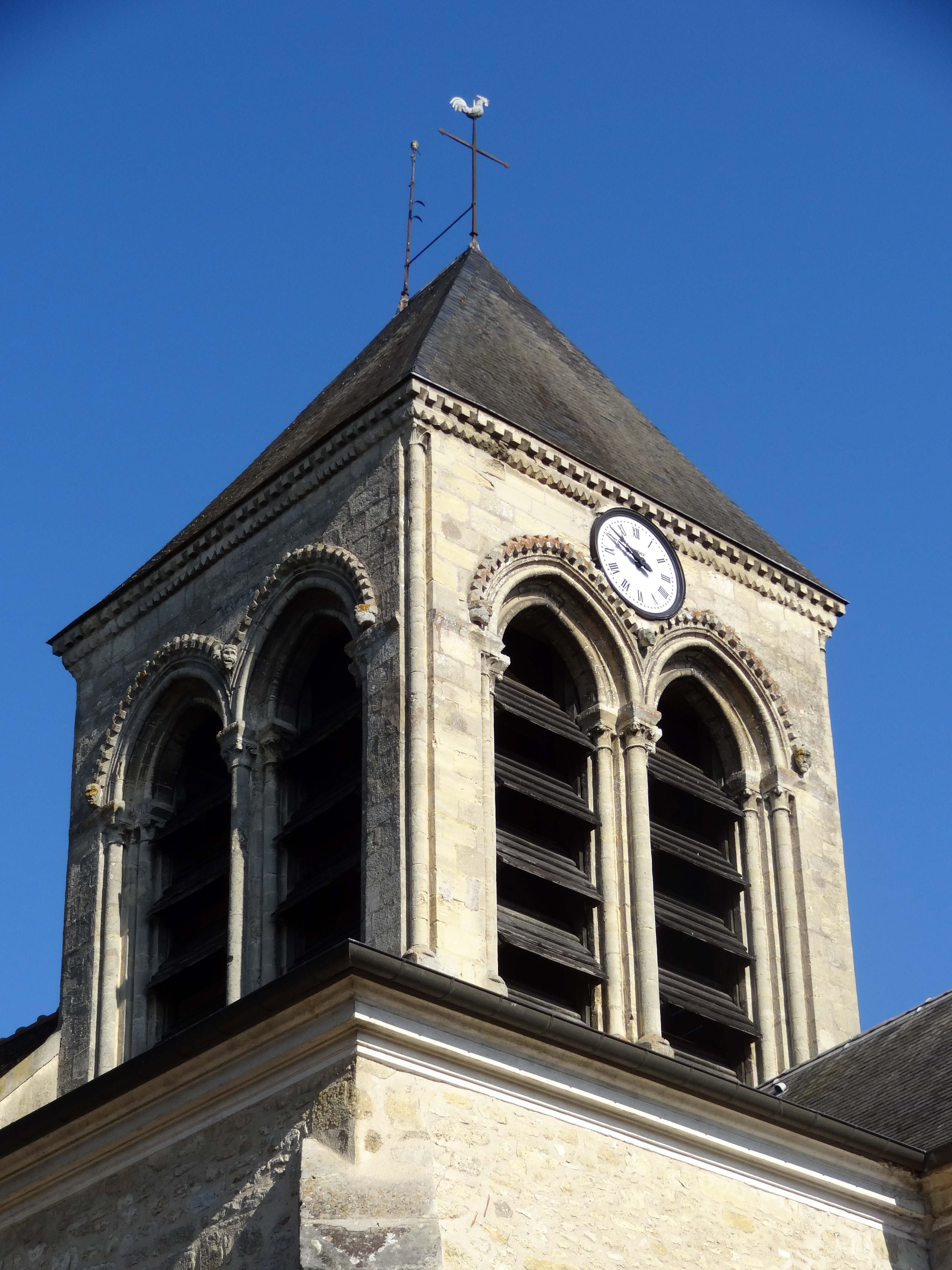 Église Saint-Séverin d'Oinville-sur-Montcient - voir titre.